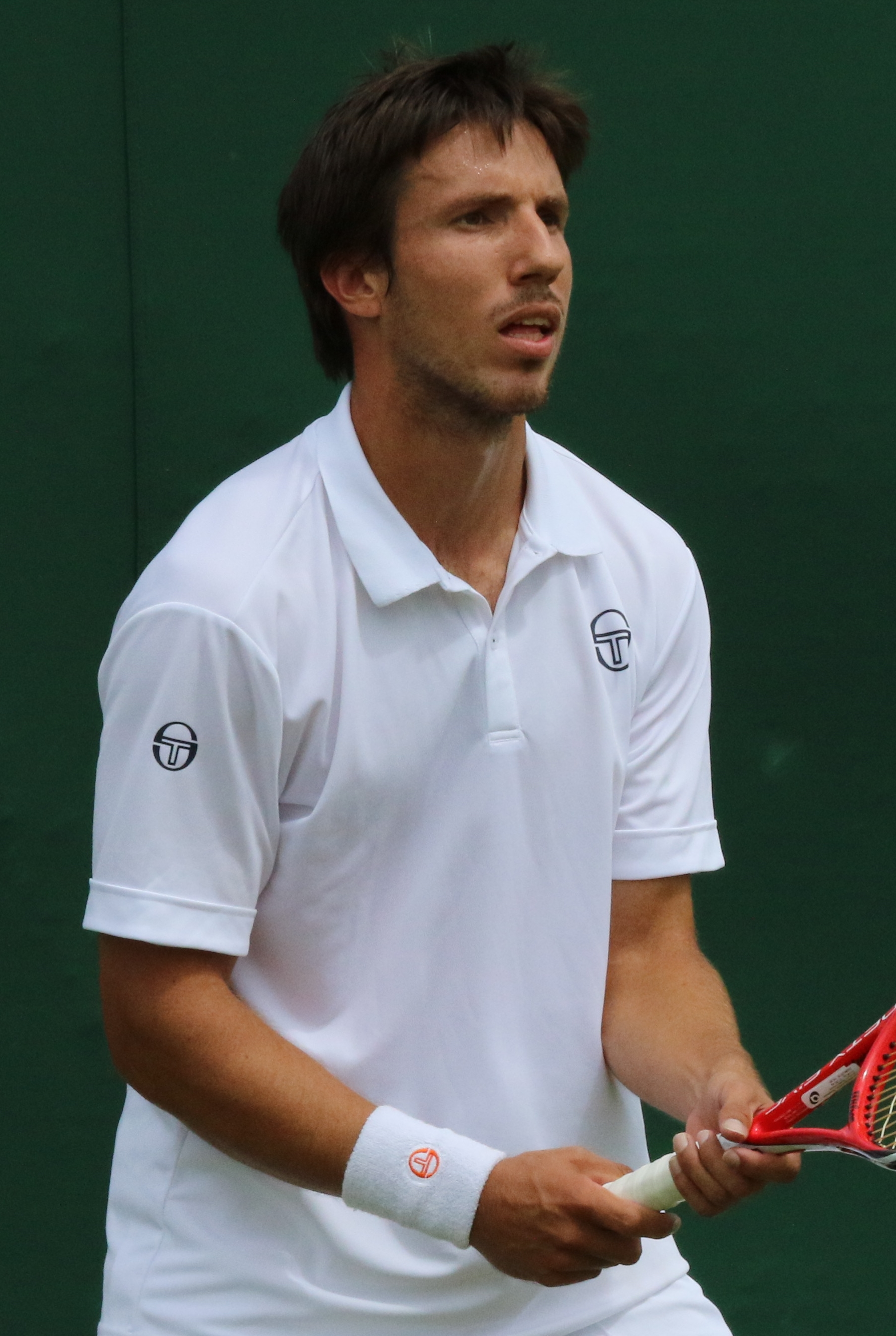 Sijsling WMQ16 (4)